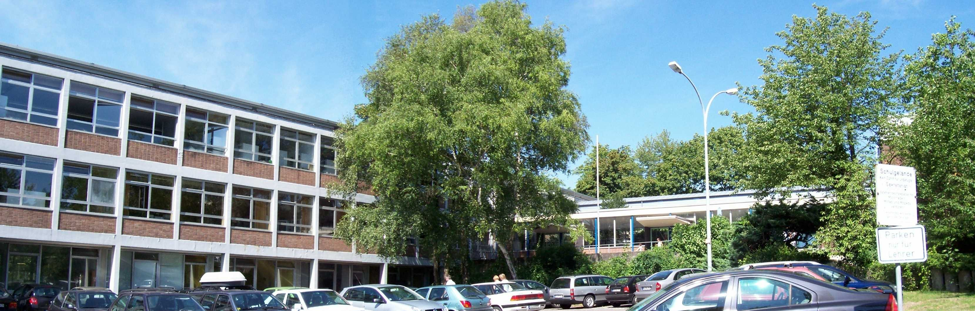 NCG Hauptgebäude Bergisch Gladbach